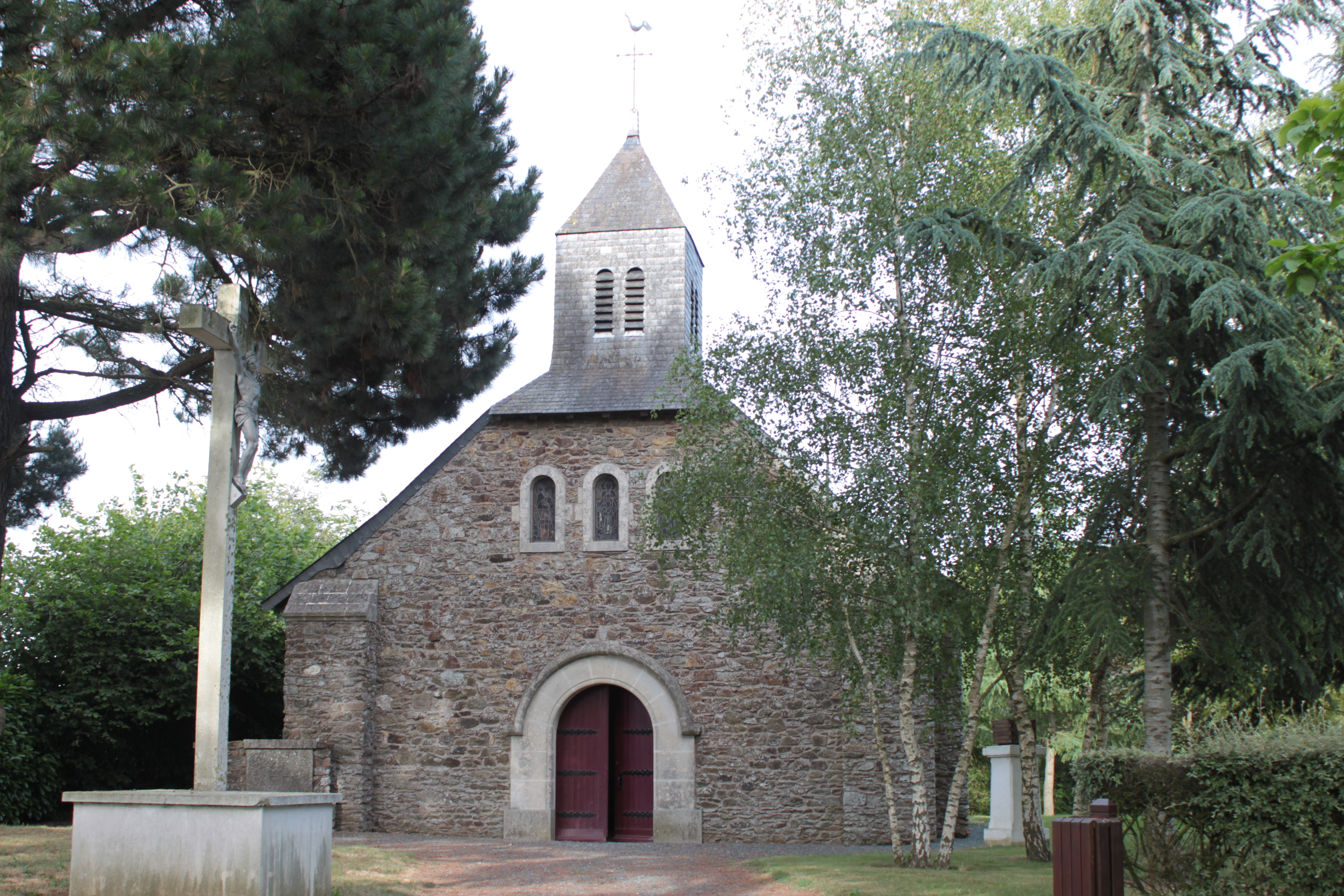 Chapelle Saint-Michel-du-Bois, 1150, La Roche-Blanche.